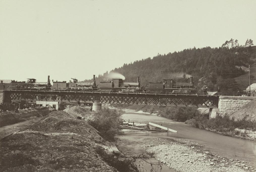 Banstrecke Winterthur-Koblenz: Belastungprobe der Tössbrücke